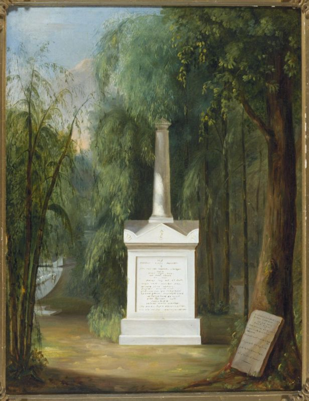 Olieverfschilderij. Het monument is ontworpen door de schilder/architect Antoine Payen (1792-1853). Kuhl (1796-1821) en Coenraad van Hasselt (1797-1823) waren leden van de Natuurkundige Commissie in Nederlandsch-Indië. Het monument staat op het bekende kerkhof Tana Abang van het voormalige Batavia (Jakarta). Een zwaarmoedige schildering, niet alleen door het onderwerp, maar een indruk die men vooral krijgt bij het zien naar de sombere, donkergroen gekleurde, hoog oprijzende bomen. Deze sombere en zwaarmoedige indruk wordt versterkt door het Rembrandtieke licht, dat geworpen wordt op een hoog monument met lingga-achtig topstuk, op welk gedenkteken een aesculaap-teken is aangebracht en o.a. te ontcijferen vallend de woorden: Mr. S. Henrici Kund. Hanoviani, waaronder: Joh. Conr. van Hasselt-Groningen-Med.Dr. Rechts, aan de voet van een boom een kerkhofsteen, waarop o.a. te ontcijferen valt: Godalex Ger. Phil Baron Capellen.. Het grafmonument van Heinrich Kuhl en Johan Coenraad van Hasselt